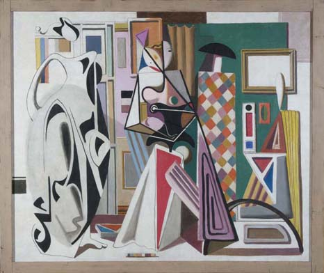 Karl Lorenz Kunz - Ölgemälde: Karneval